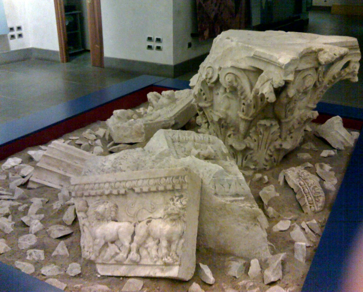 Alcuni reperti del Museo Stazione Neapolis di Napoli.